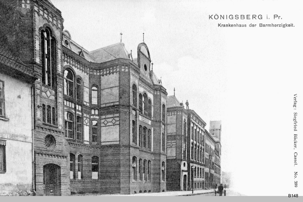 Königsberg